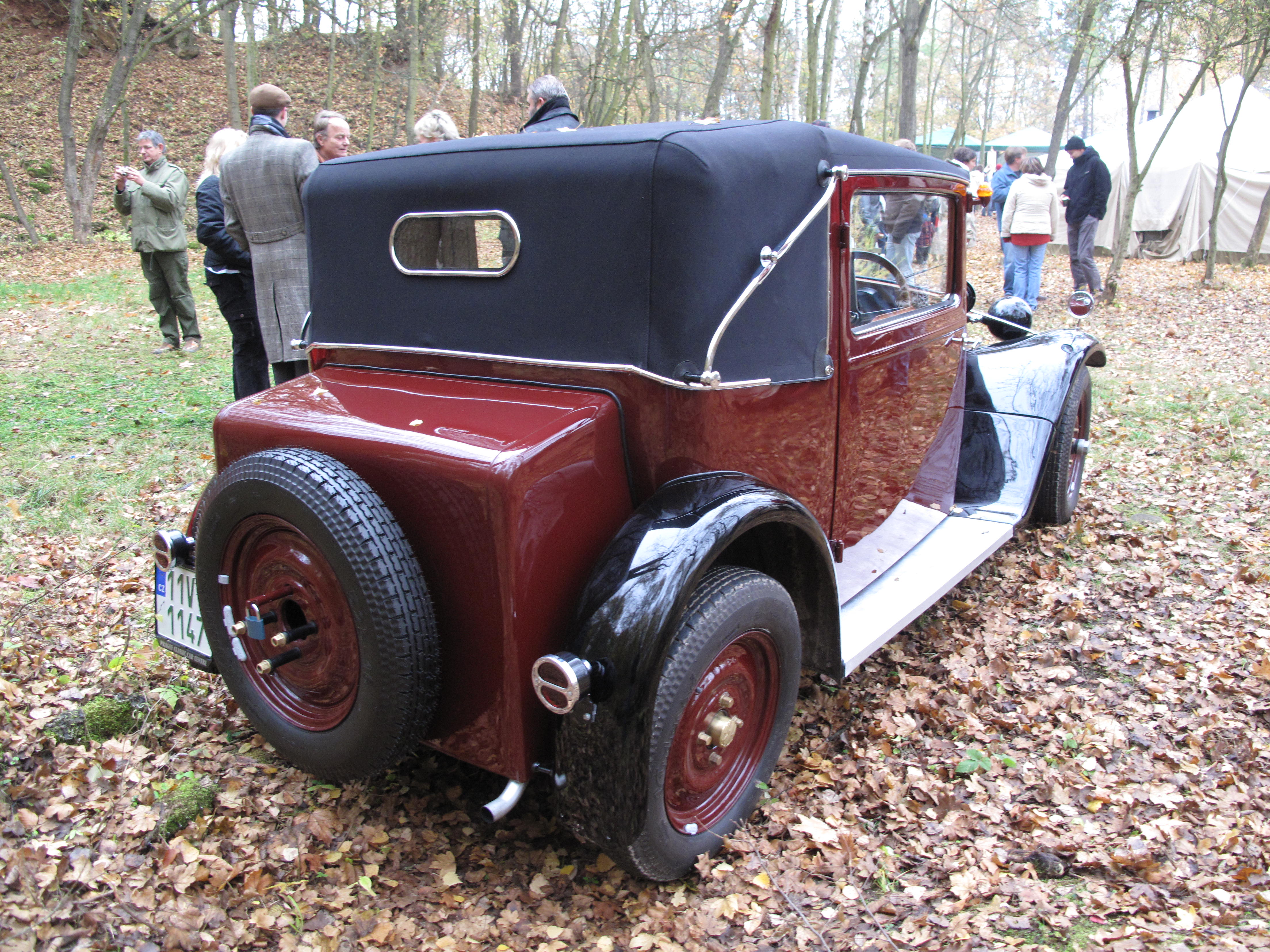 Solvayovy lomy